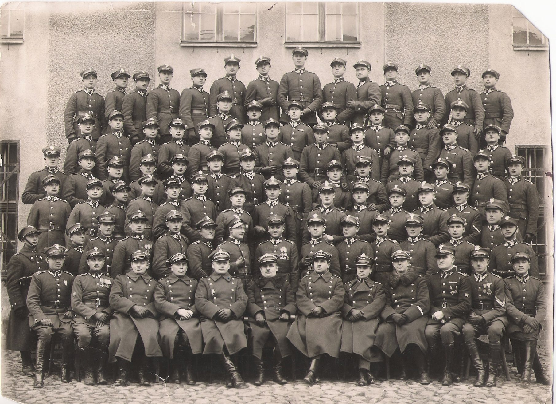 Szkoła podoficerów piechoty w Grudziądzu